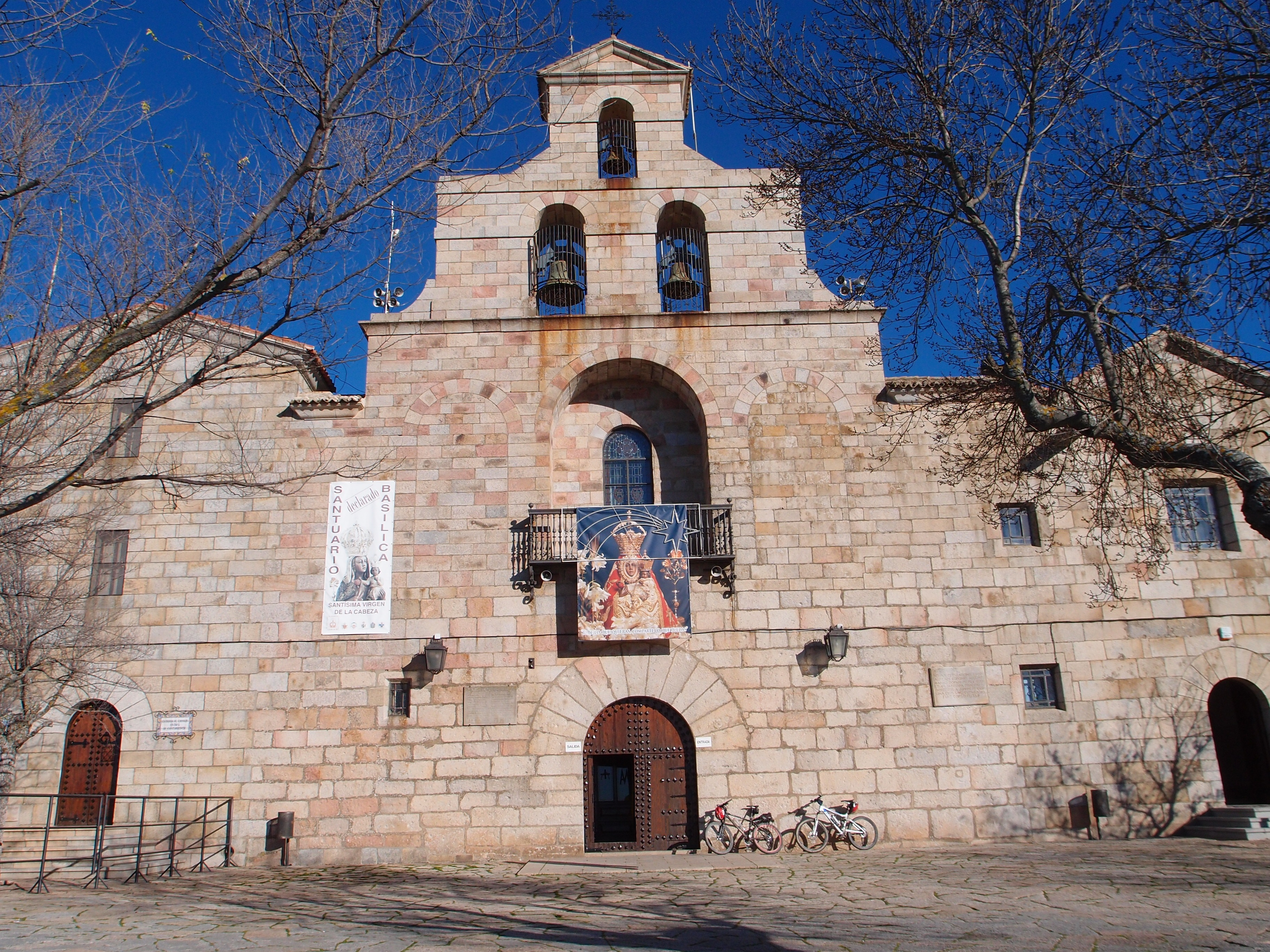 Vista general de la fachada de la Basílica de la Virgen de la Cabeza, Andújar, Jaén.